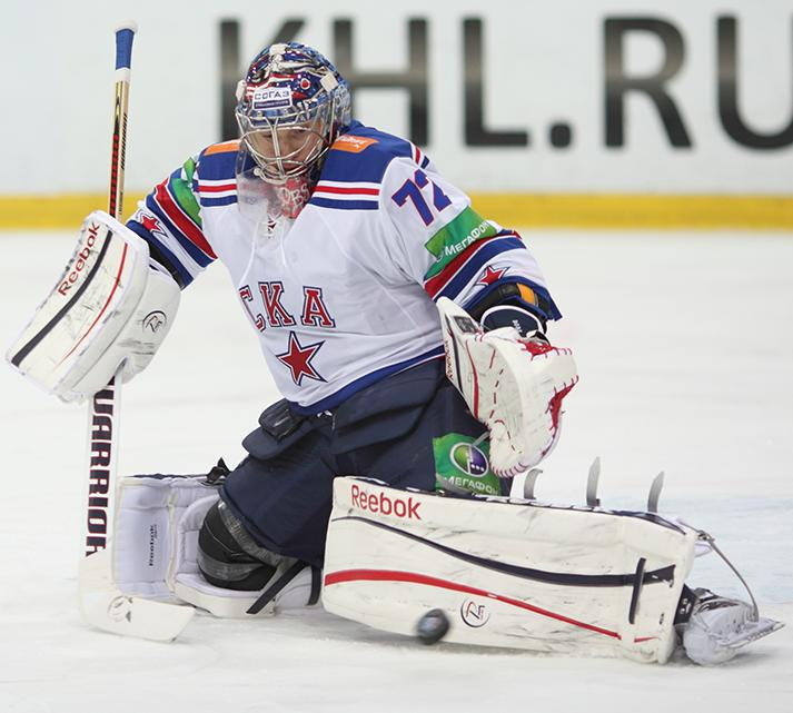 Вратарь СКА Сергей Бобровский во время матча чемпионата КХЛ против новокузнецкого «Металлурга» 19 декабря 2012 года.